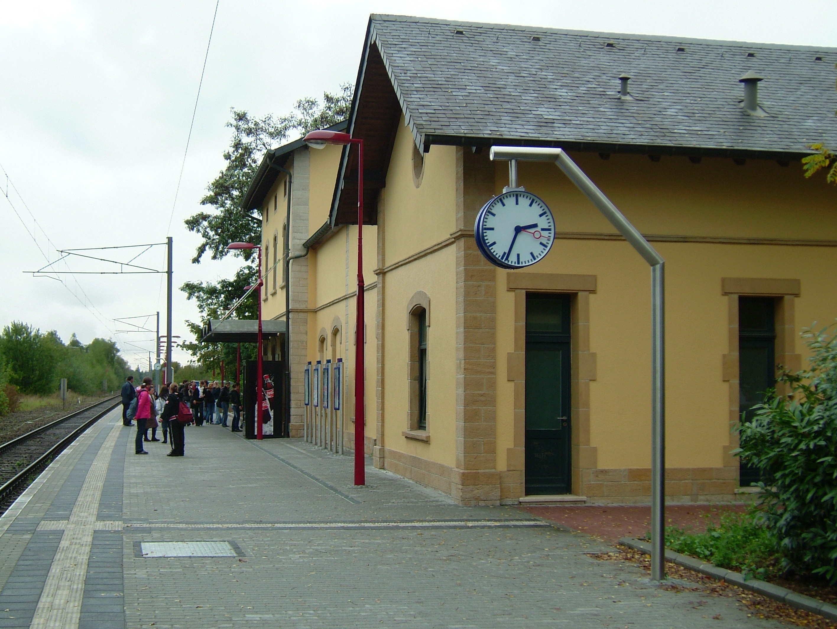 Gare Diddeleng - Zenter.